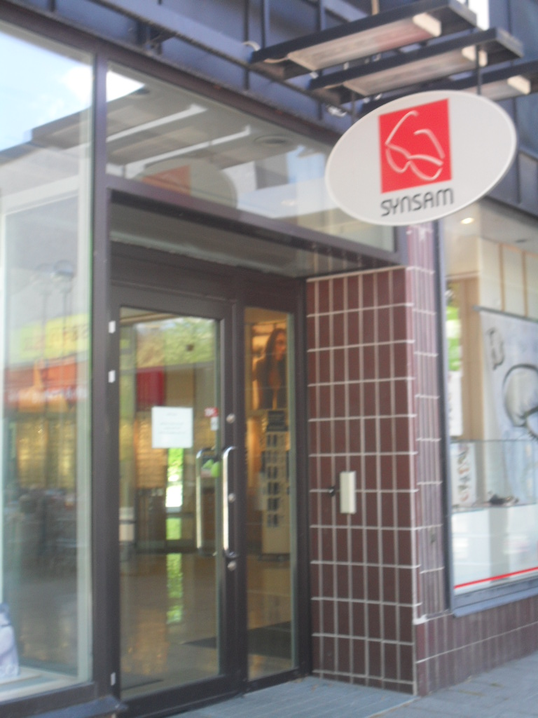 Synsam